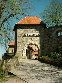 Description: Eingangstor der "Elgersburg" in Elgersburg in Thüringen (Ilmkreis) Source: photo taken by Paula Miller Date: Juli 2003 Author: Paula Miller Permission: Public domain